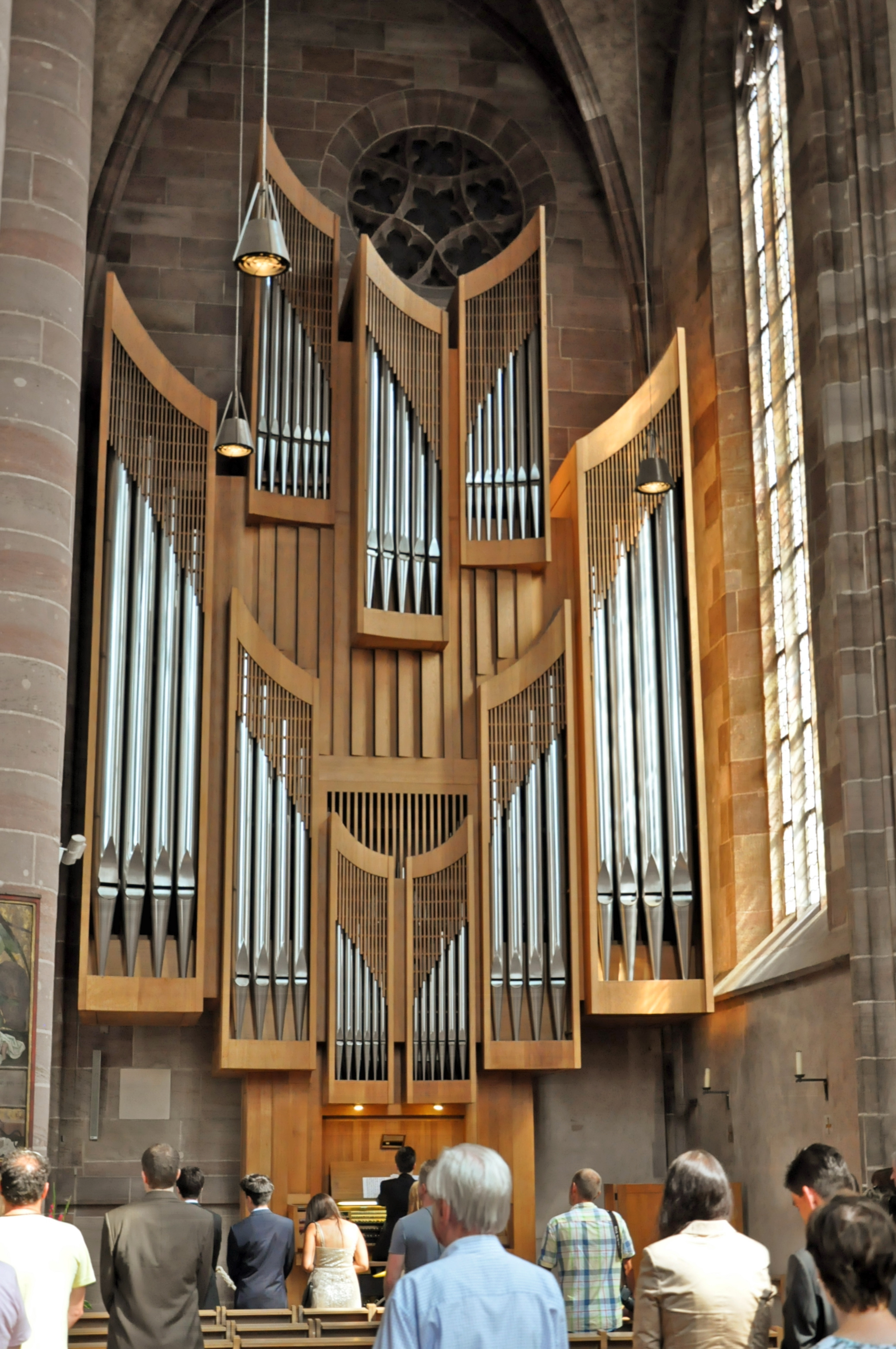 Orgel in der Frauenkirche Nürnberg